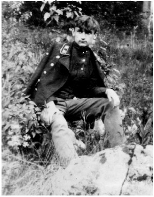 Арсен Річинський на березі річки Тетерева. Житомир.